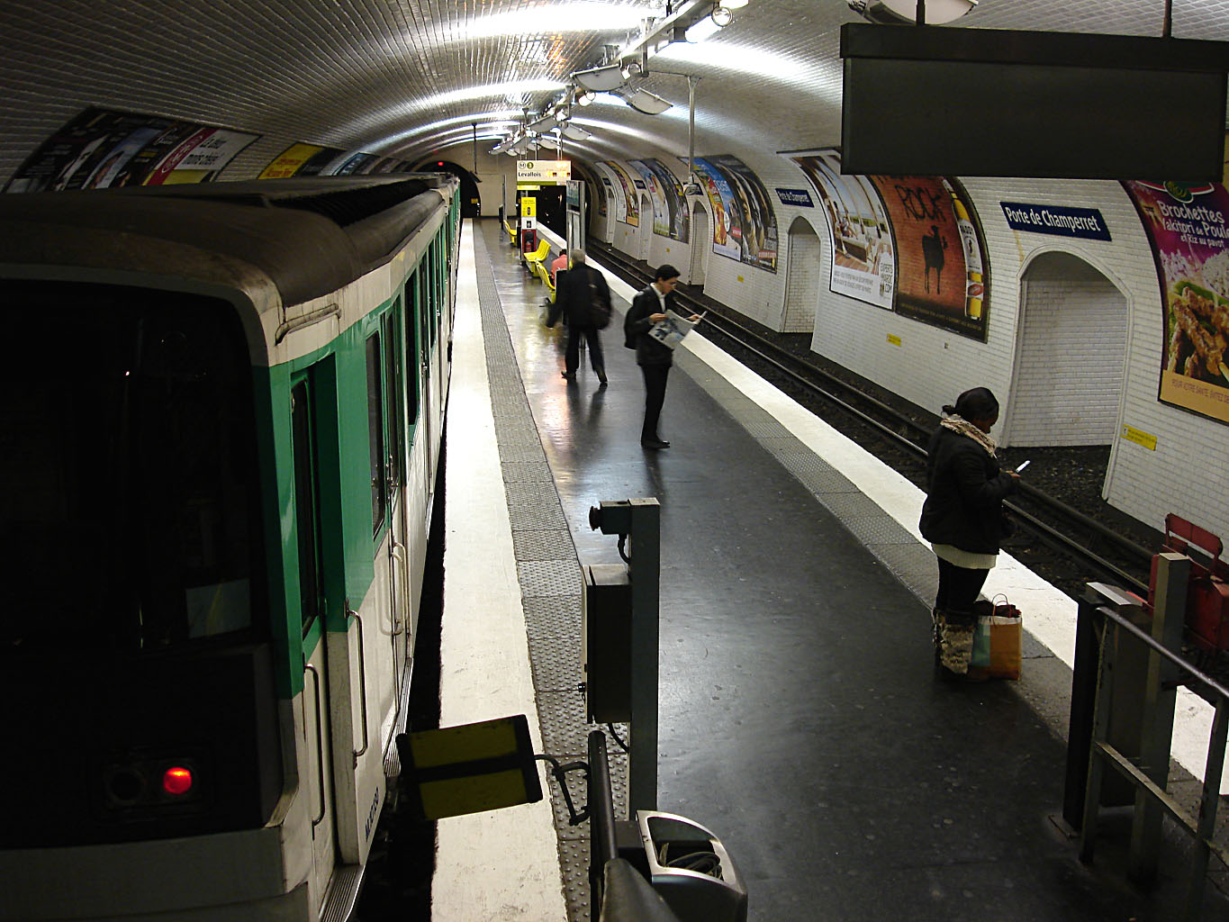 La station Porte de Champerret de la ligne 3 du métro de Paris, France